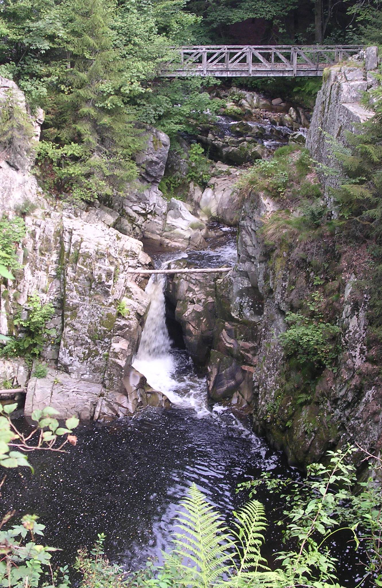 France, Lorraine, Vosges, Saint Amé, la Cleurie photo en surplomb d'une cascade sur le lit de la Cleurie sur la commune de saint amé, vue depuis le parc miniature.